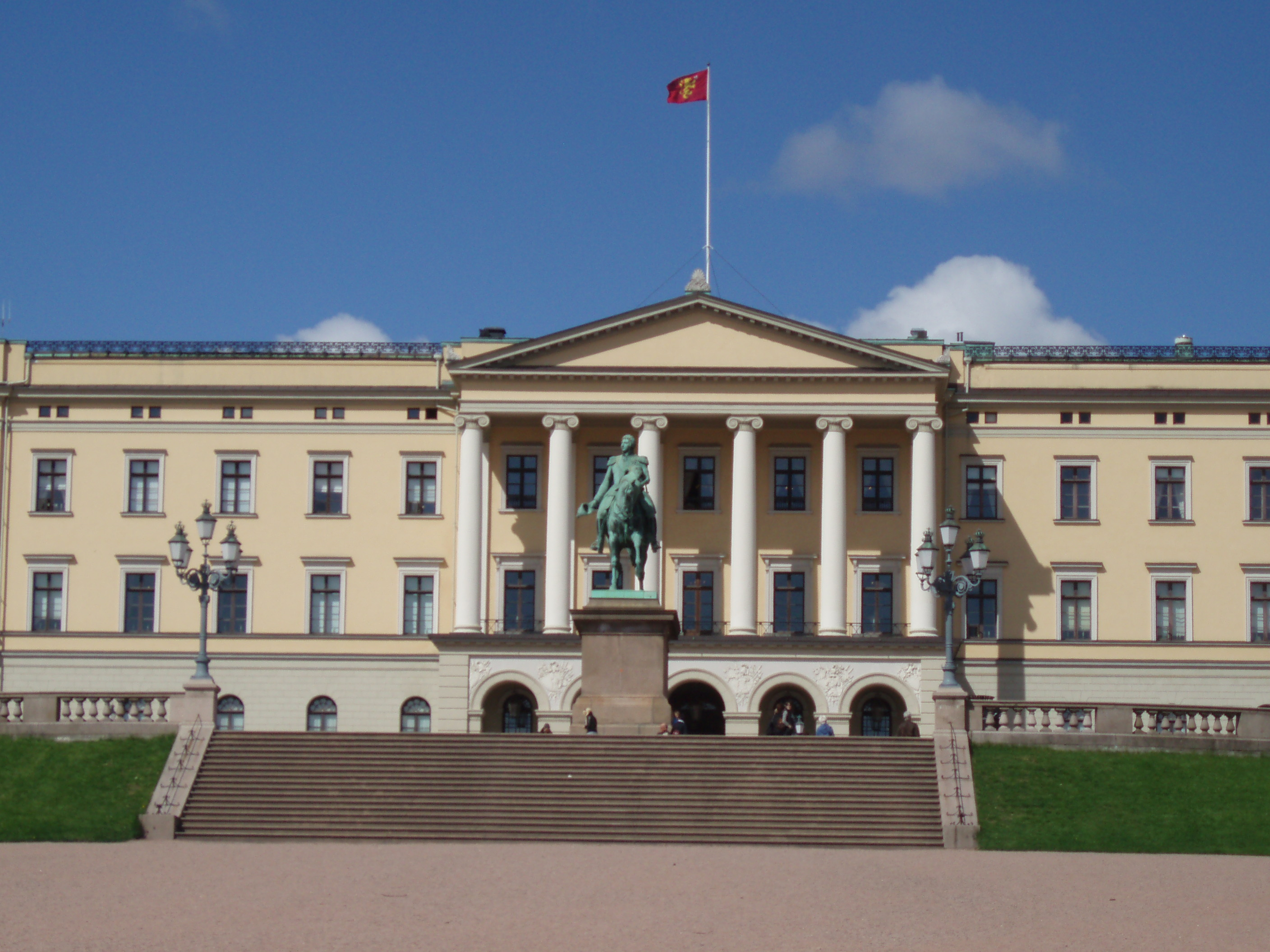 Kralovsky palac